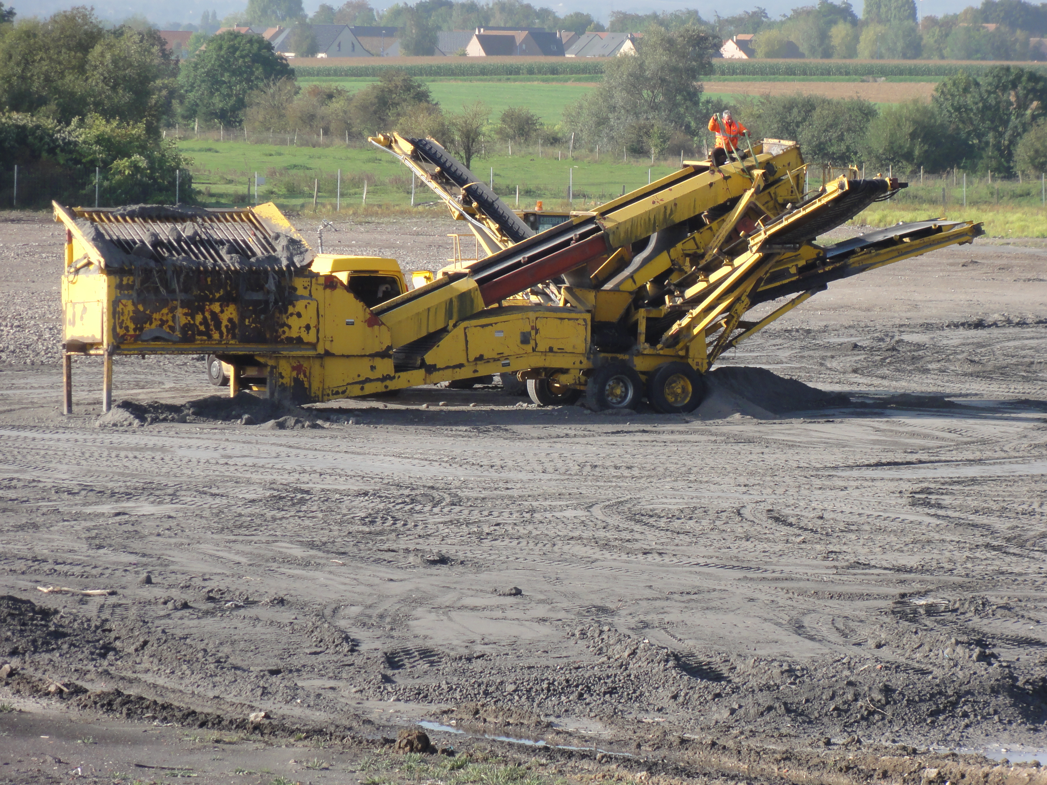 Terril n° 64 dit Cendres de Vermelles, Compagnie des mines de Béthune dans le bassin minier du Nord-Pas-de-Calais, Vermelles, Pas-de-Calais, Nord-Pas-de-Calais, France.